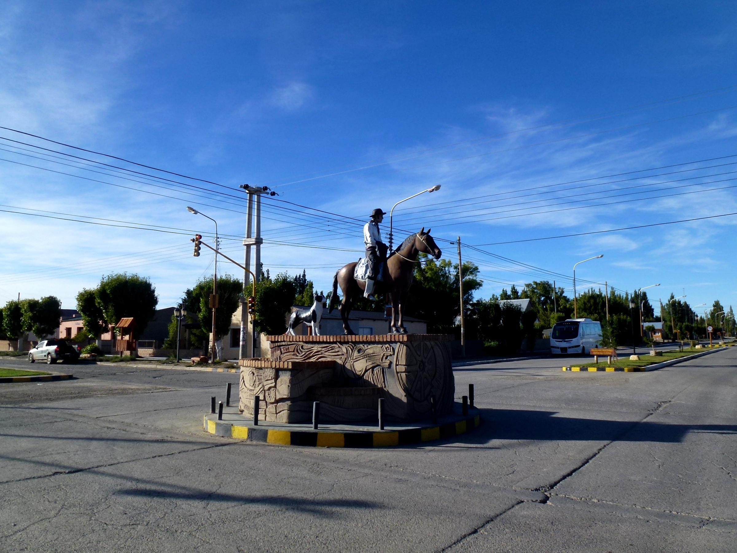 Monumento al Gaucho. Gobernador Gregores, Prov. de Santa Cruz, Argentina